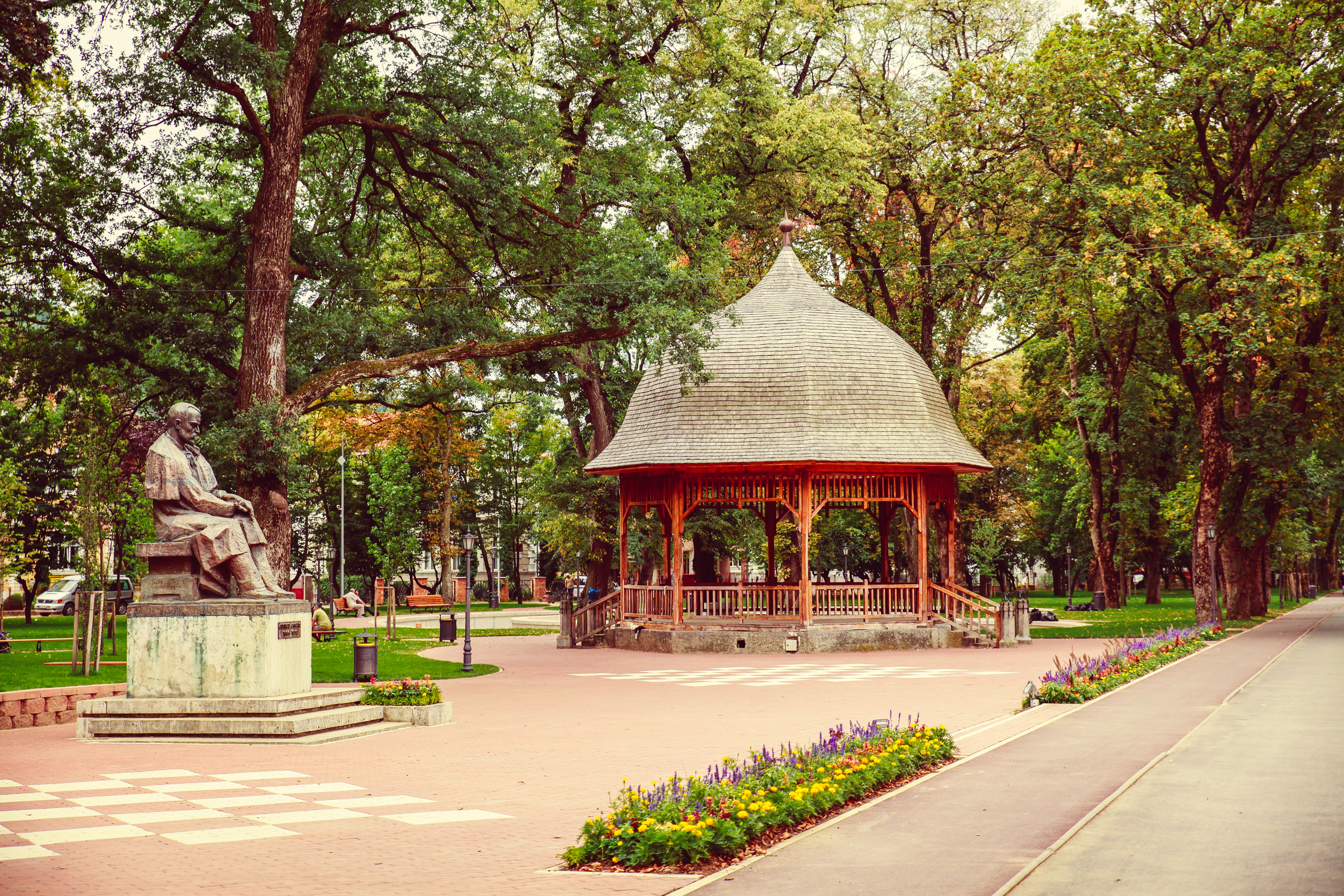 Bistrita - August 2013